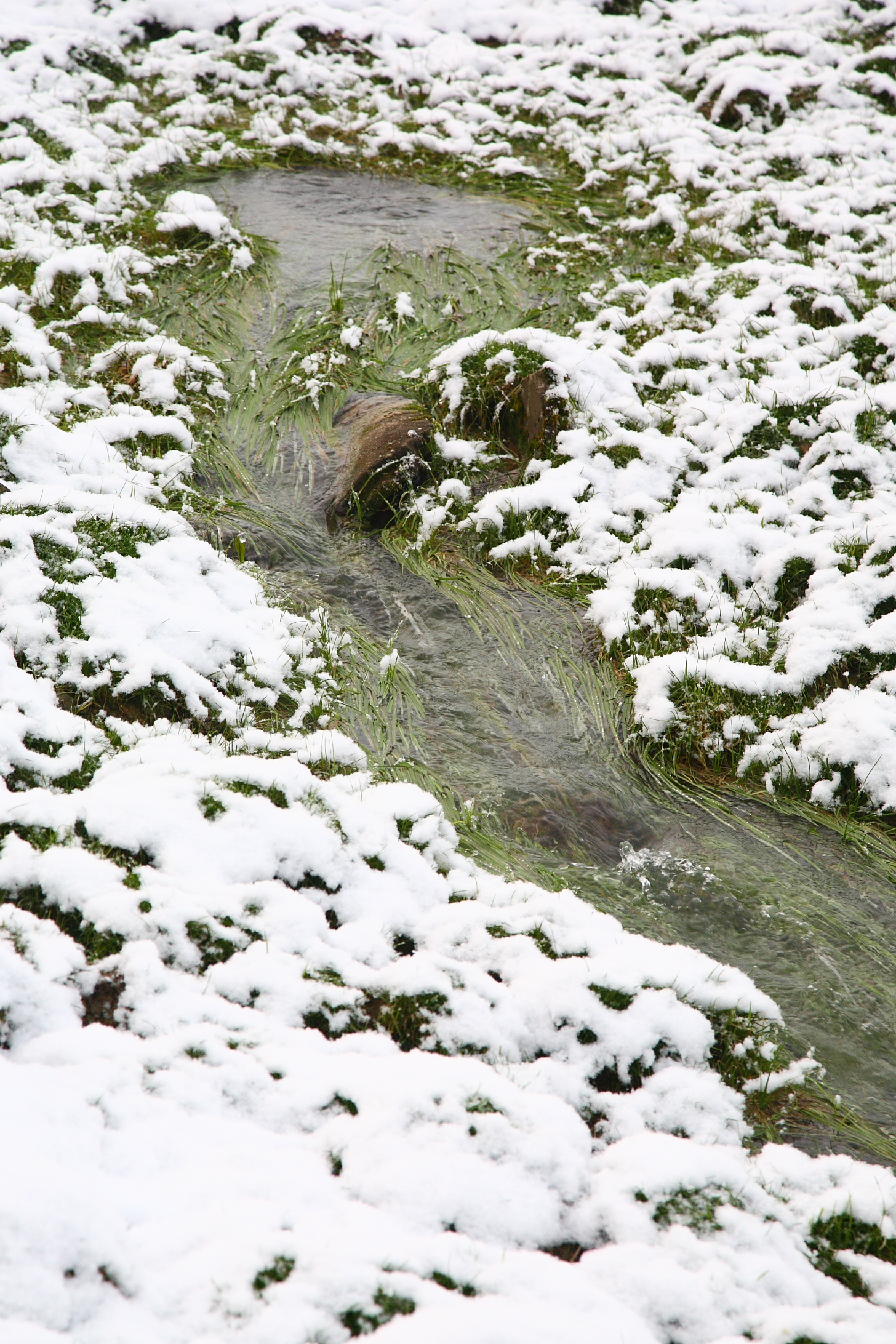 Quickspring